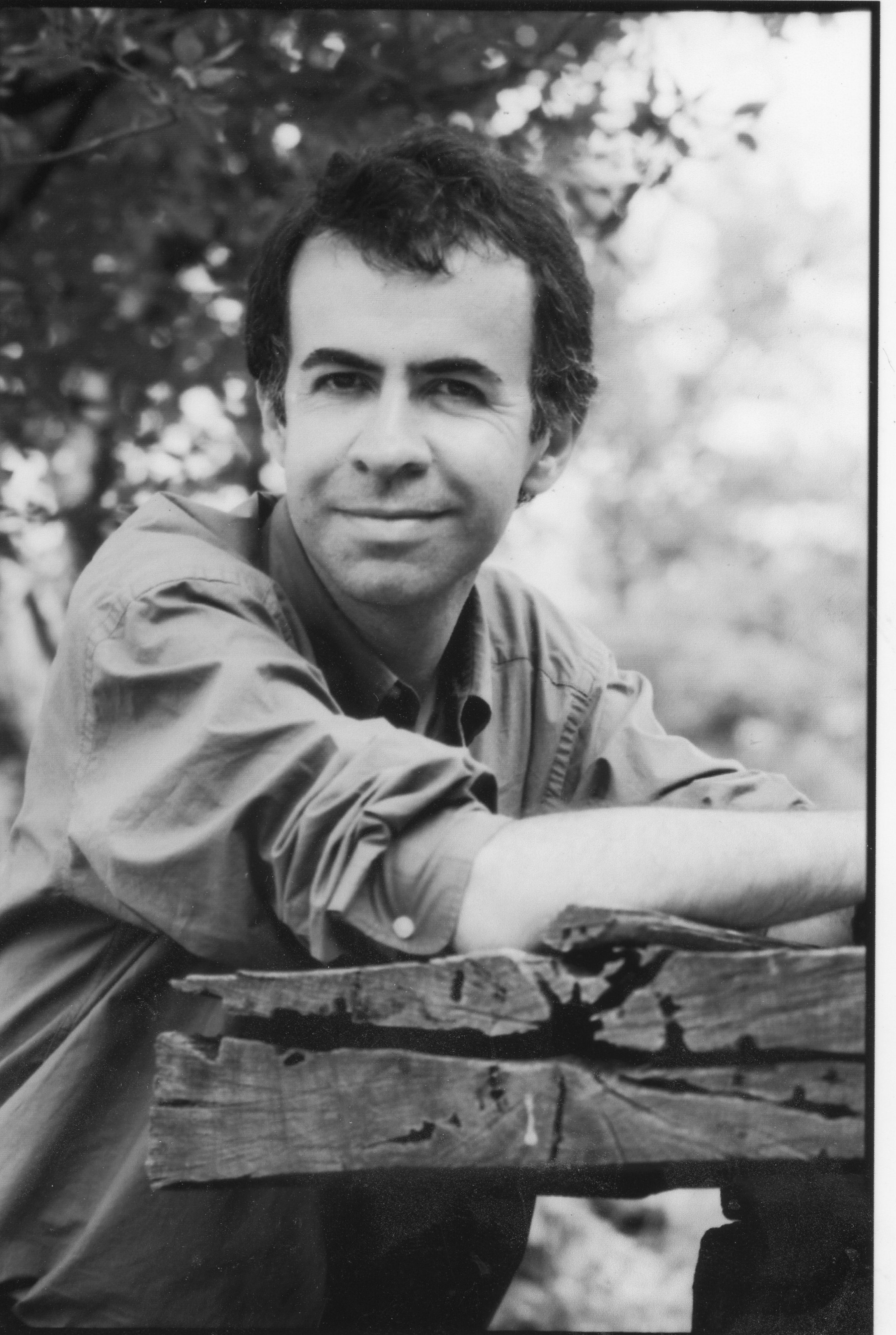 Eric Faye